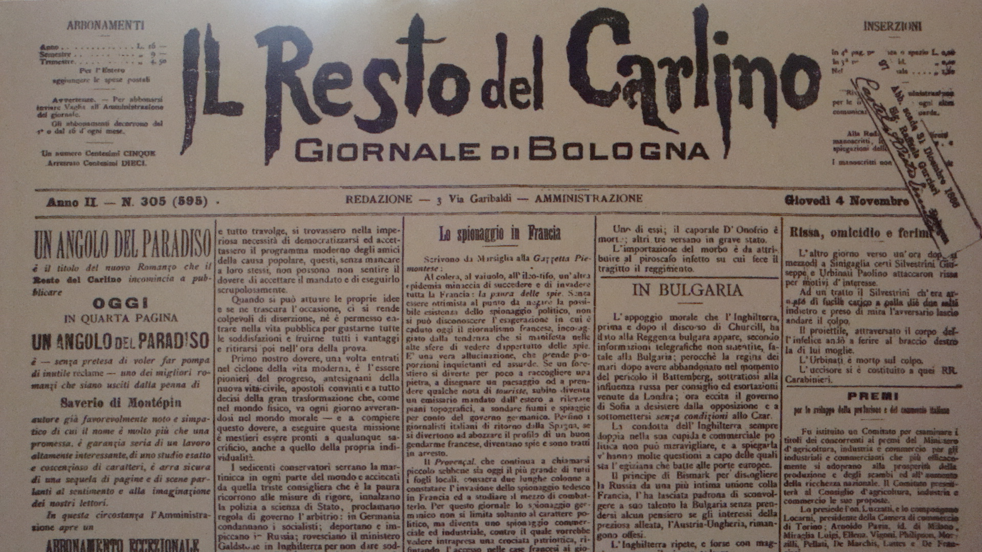 Prima pagina de il Resto del Carlino del 4 novembre 1886 (Anno II).